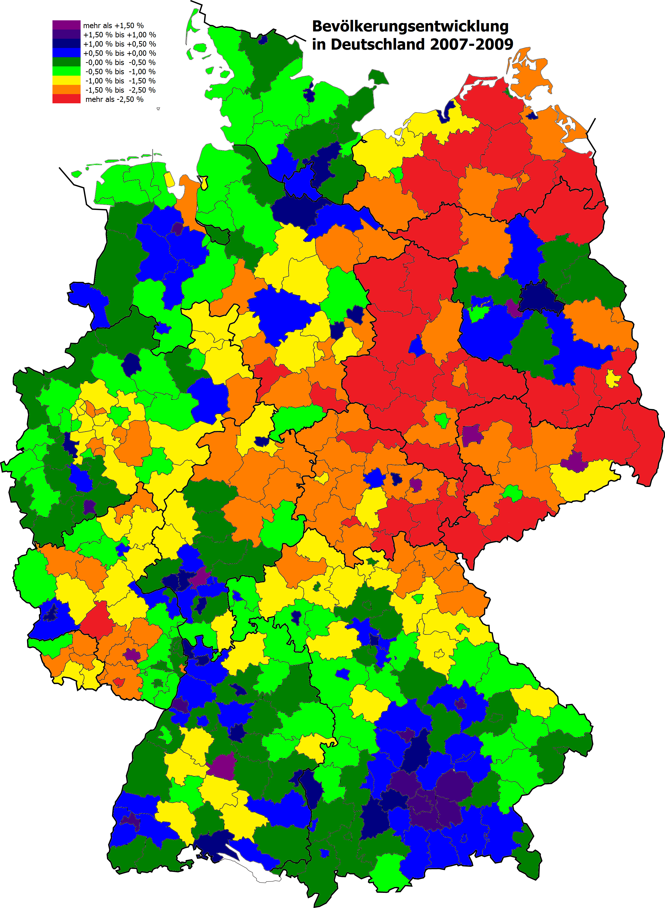 Bevölkerungsentwicklung der deutschen Landkreise von 31.12.07 bis 31.12.09.